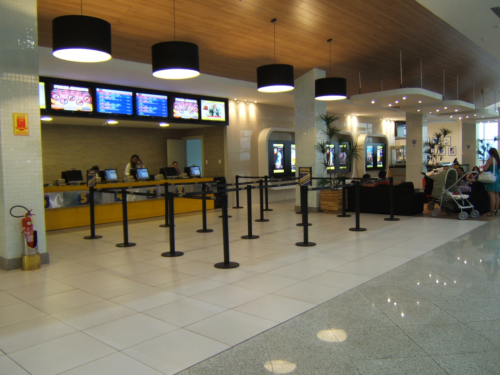 Guichês do cinema do shopping Via Sul